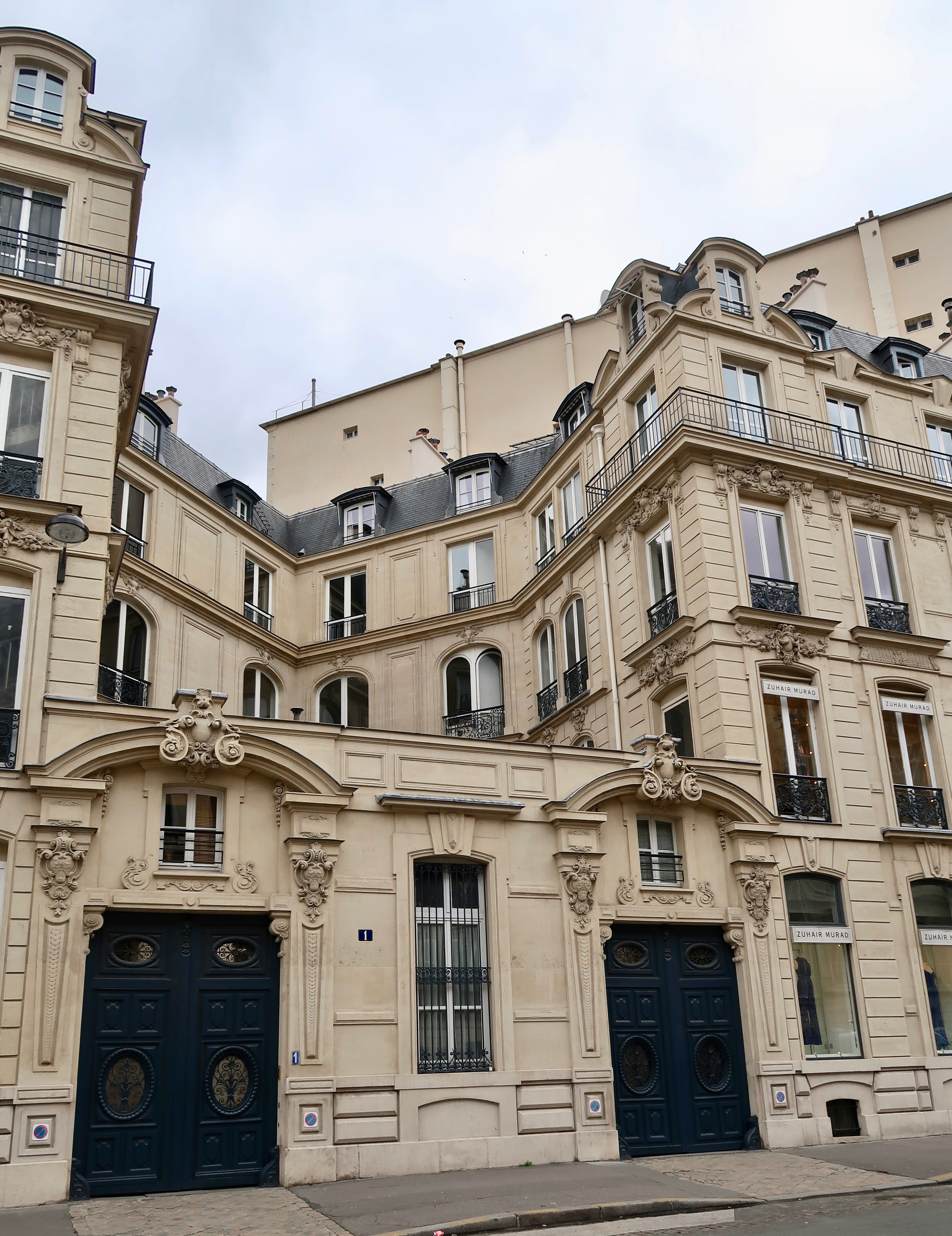 1 rue François-Ier (Paris, 8e).